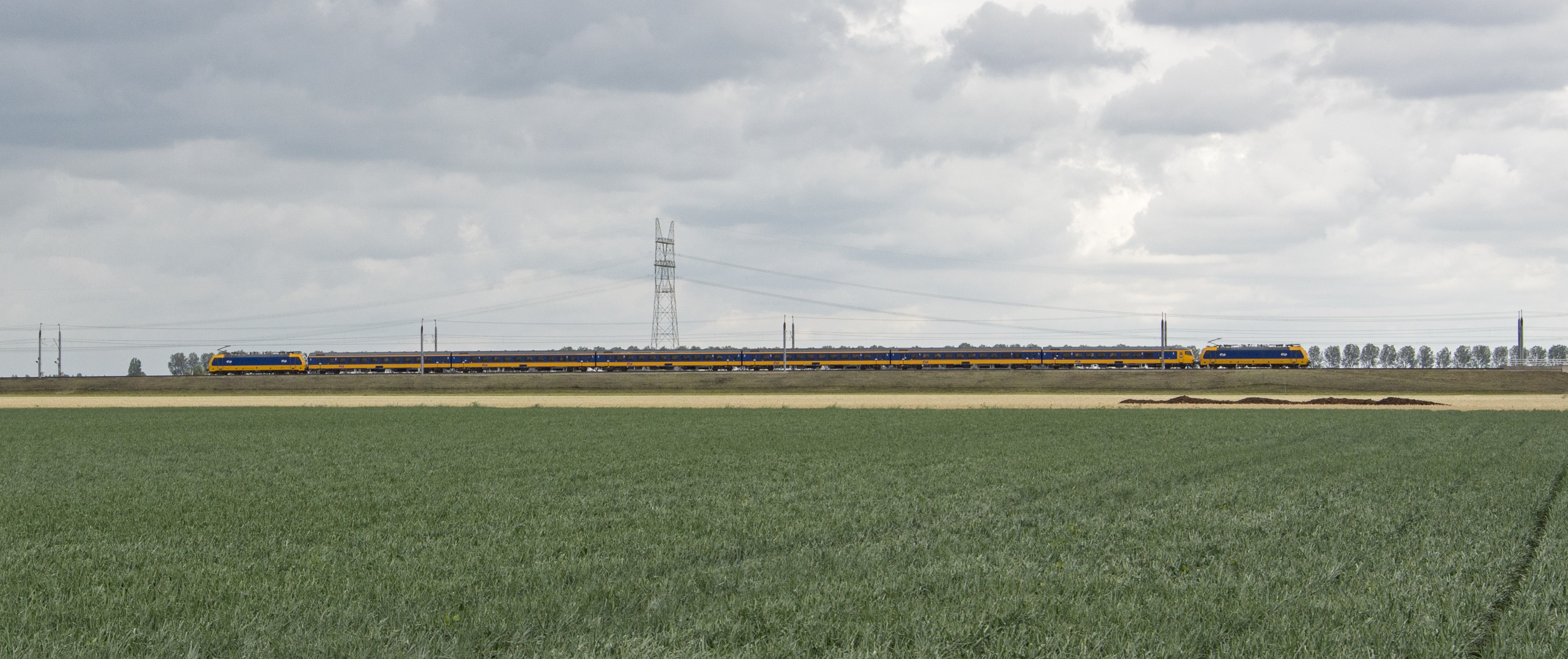 Bij het Groene Hart van Nederland ter hoogte van Benthuizen duikt de HSL met NS E186 003 + AmRo 16121 + NS E186 001 in de tunnelbak. Inclusief toeritten bedraagt de lengte zelfs 8,5 kilometer.